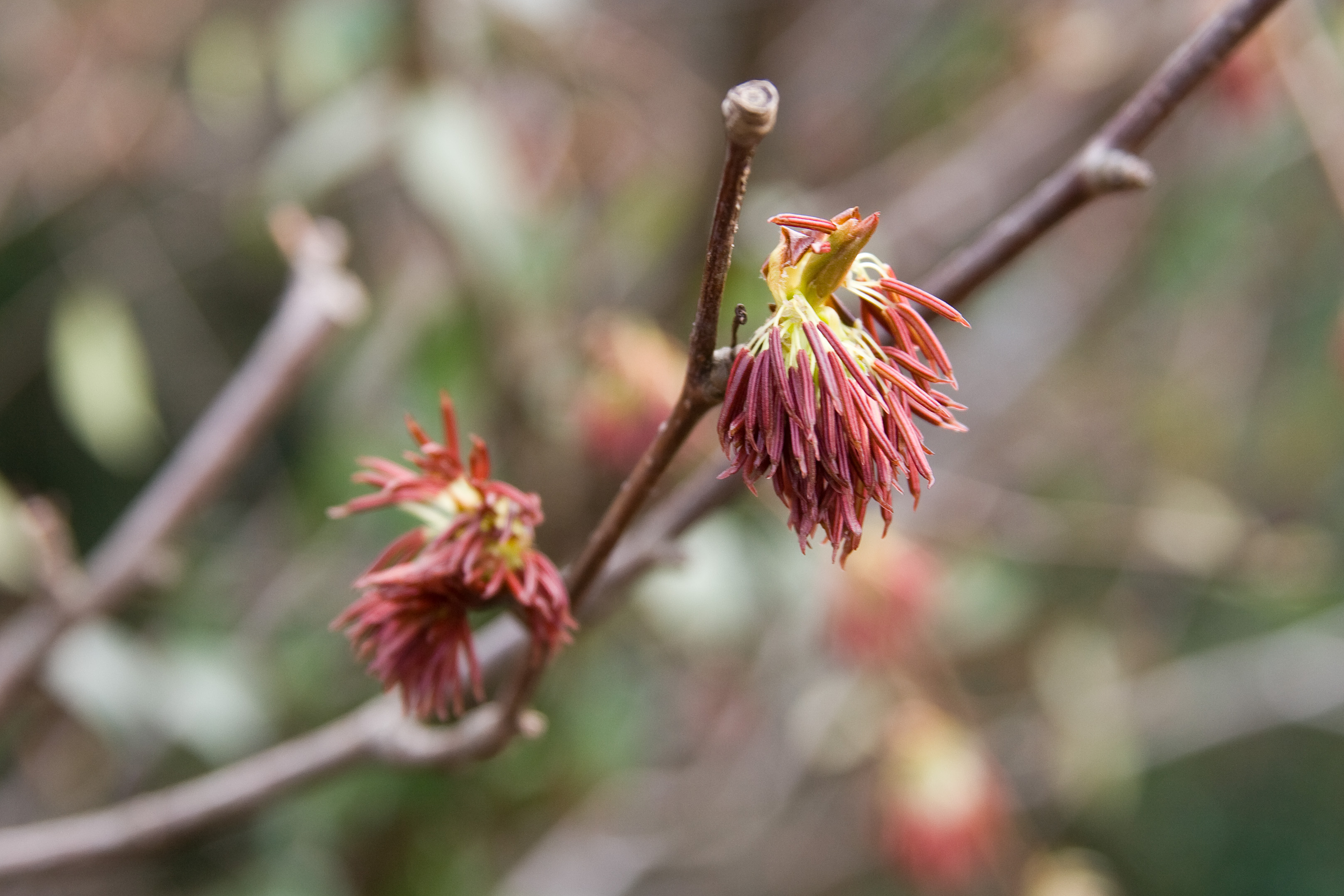 フサザクラ (学名:Euptelea polyandra)